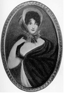 Jane Colden (March 27, 1724 – March 10, 1766)